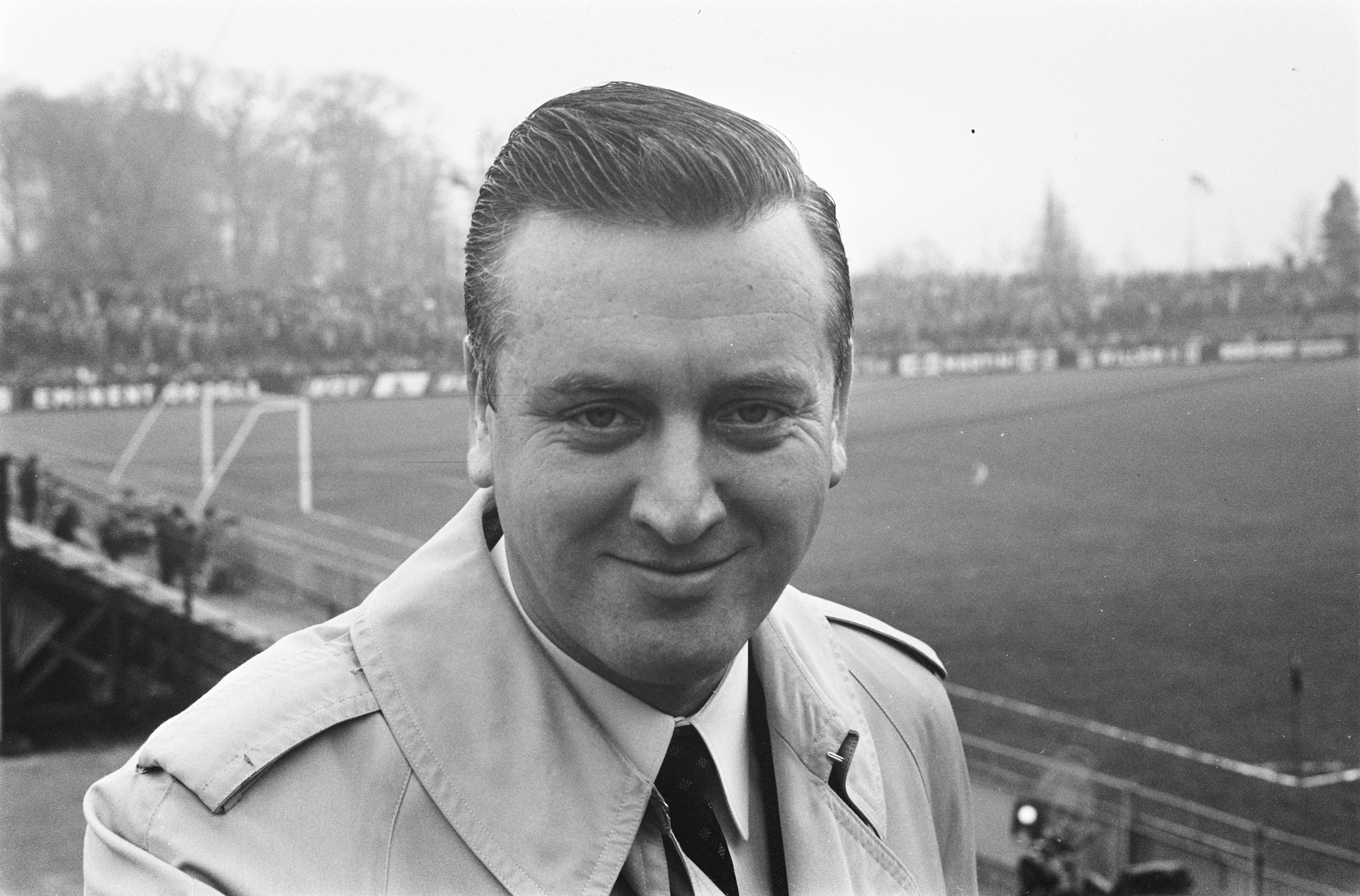 Collectie / Archief : Fotocollectie Anefo Reportage / Serie : [ onbekend ] Beschrijving : Vitesse-SVV 1-0. Televisie-verslaggever Koen Verhoef Datum : 1 december 1968 Locatie : Arnhem Trefwoorden : journalisten, portretten, portretten, sport, televisie, verslaggevers, voetbal Persoonsnaam : Verhoef, Koen Fotograaf : Koch, Eric / Anefo Auteursrechthebbende : Nationaal Archief Materiaalsoort : Negatief (zwart/wit) Nummer archiefinventaris : bekijk toegang 2.24.01.05 Bestanddeelnummer : 921-9056